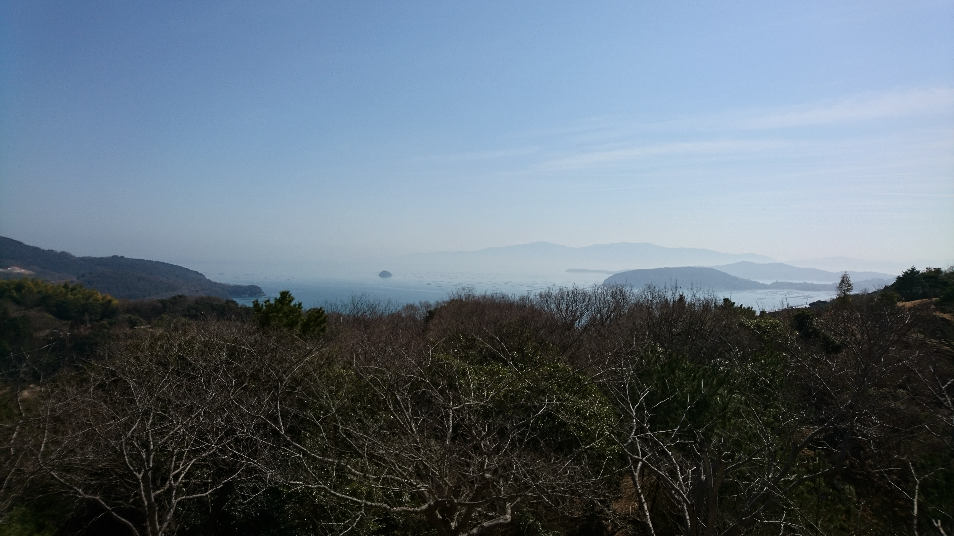 岡山ブルーラインの眺望ポイント。